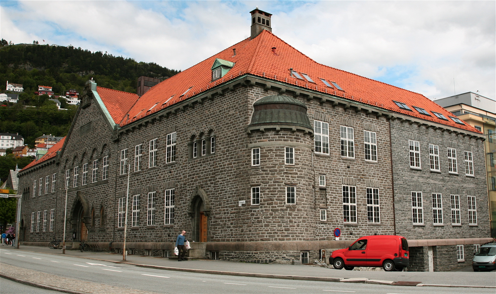 Bergen Offentlige Bibliotek, in Bergen,Norway